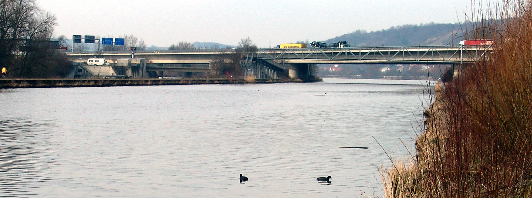 Brücke der A93 über die Donau, im Vordergrund: Fußgängerbrücke